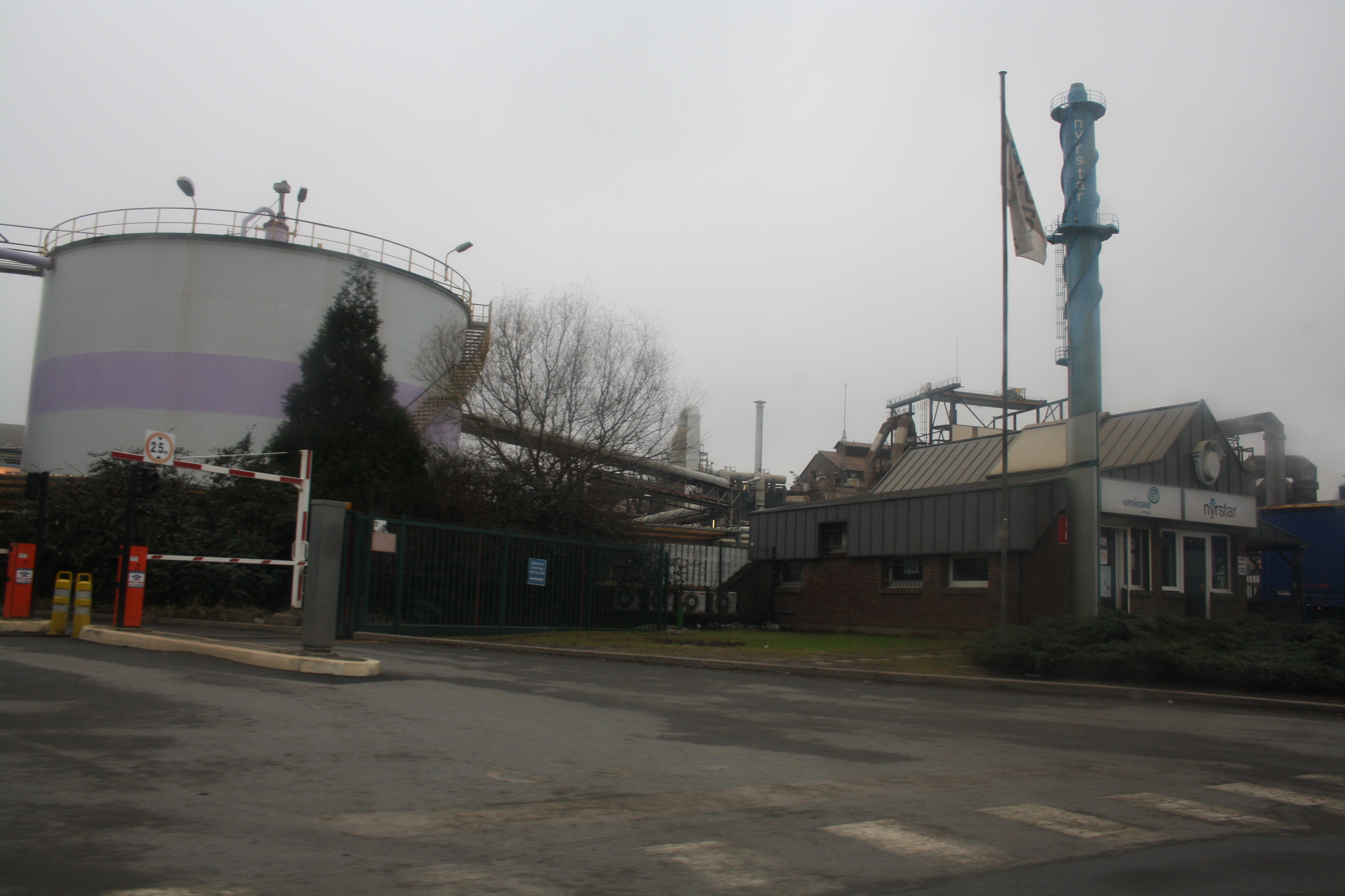 Usine Les Asturies à Auby (France).